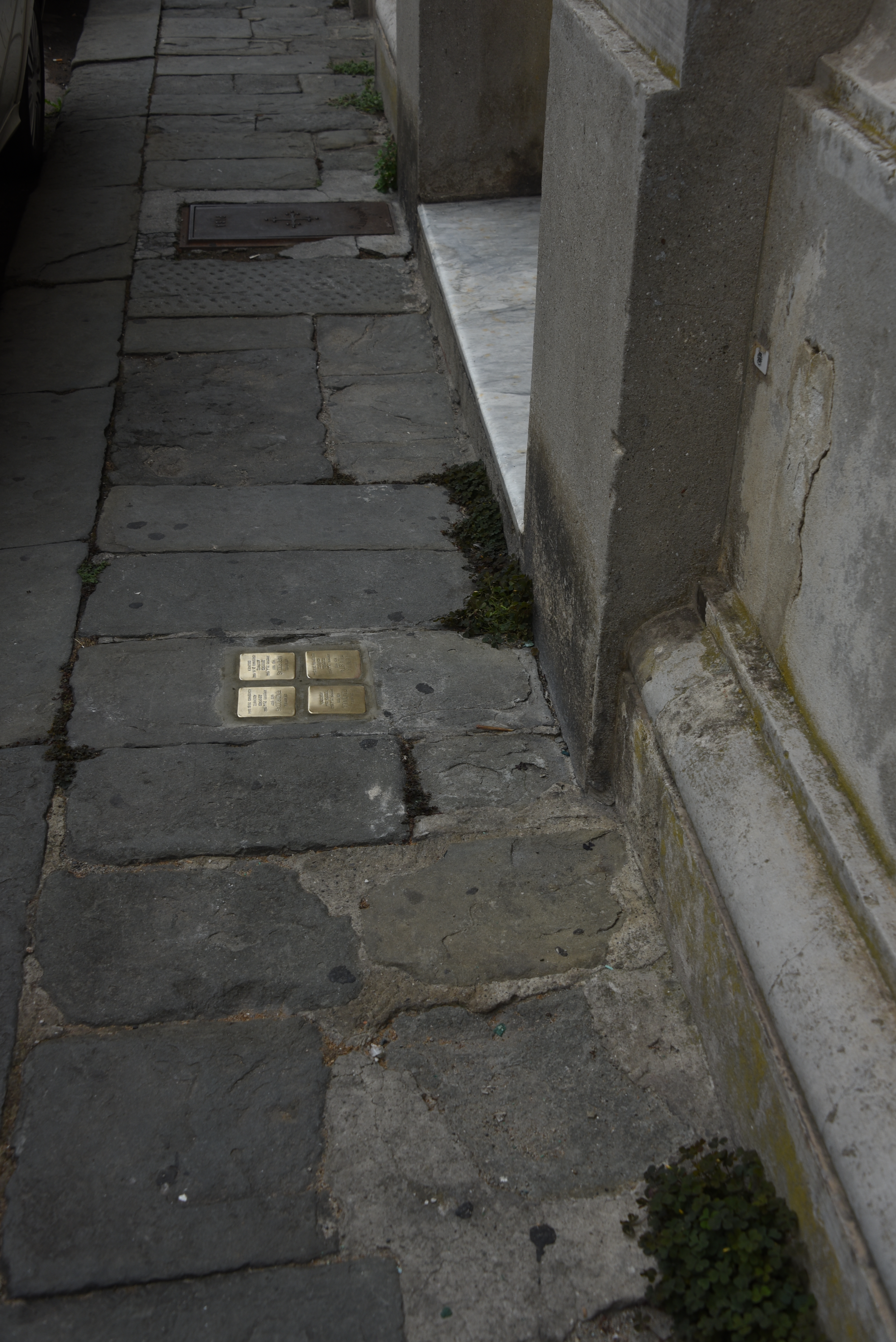 Stolpersteine in Pisa , Piazza S. Paolo all’Orto 19